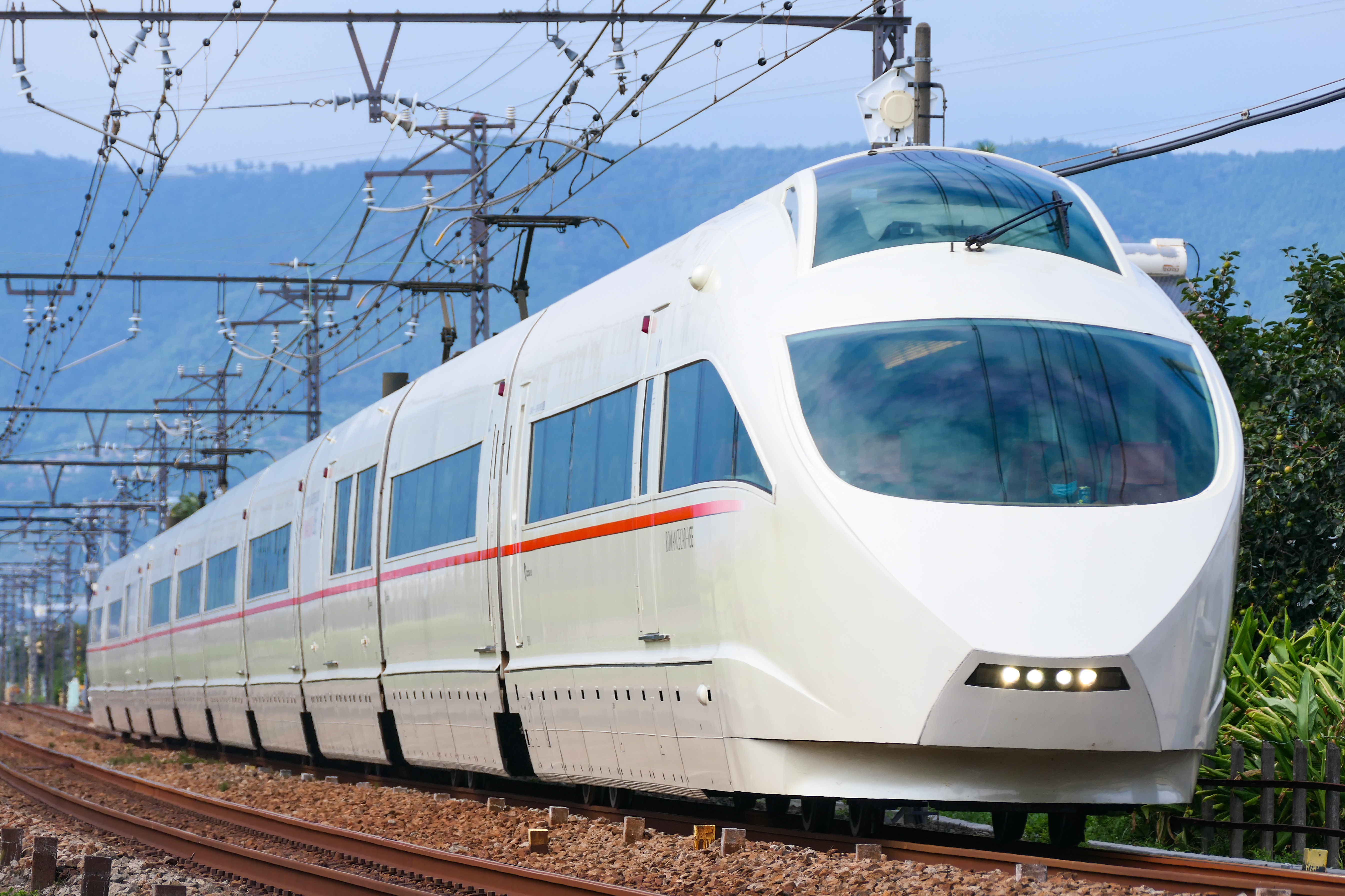 小田原線富水駅付近を走行する小田急50000形ロマンスカーはこね号